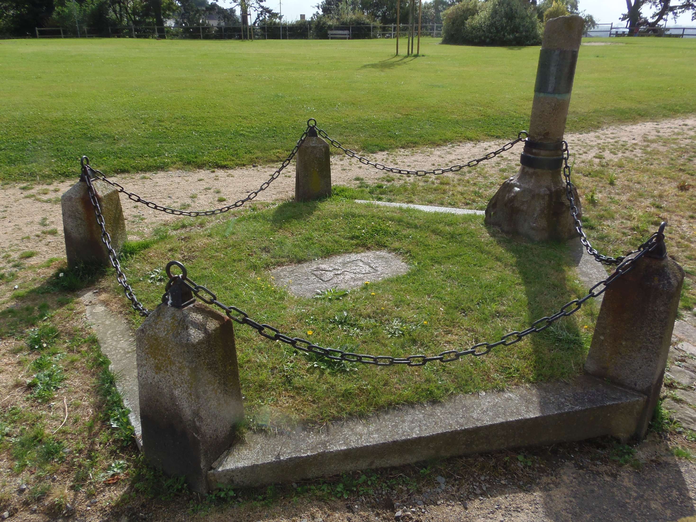 Avranches (Normandie, France). Le monument Henri II Plantagenêt.